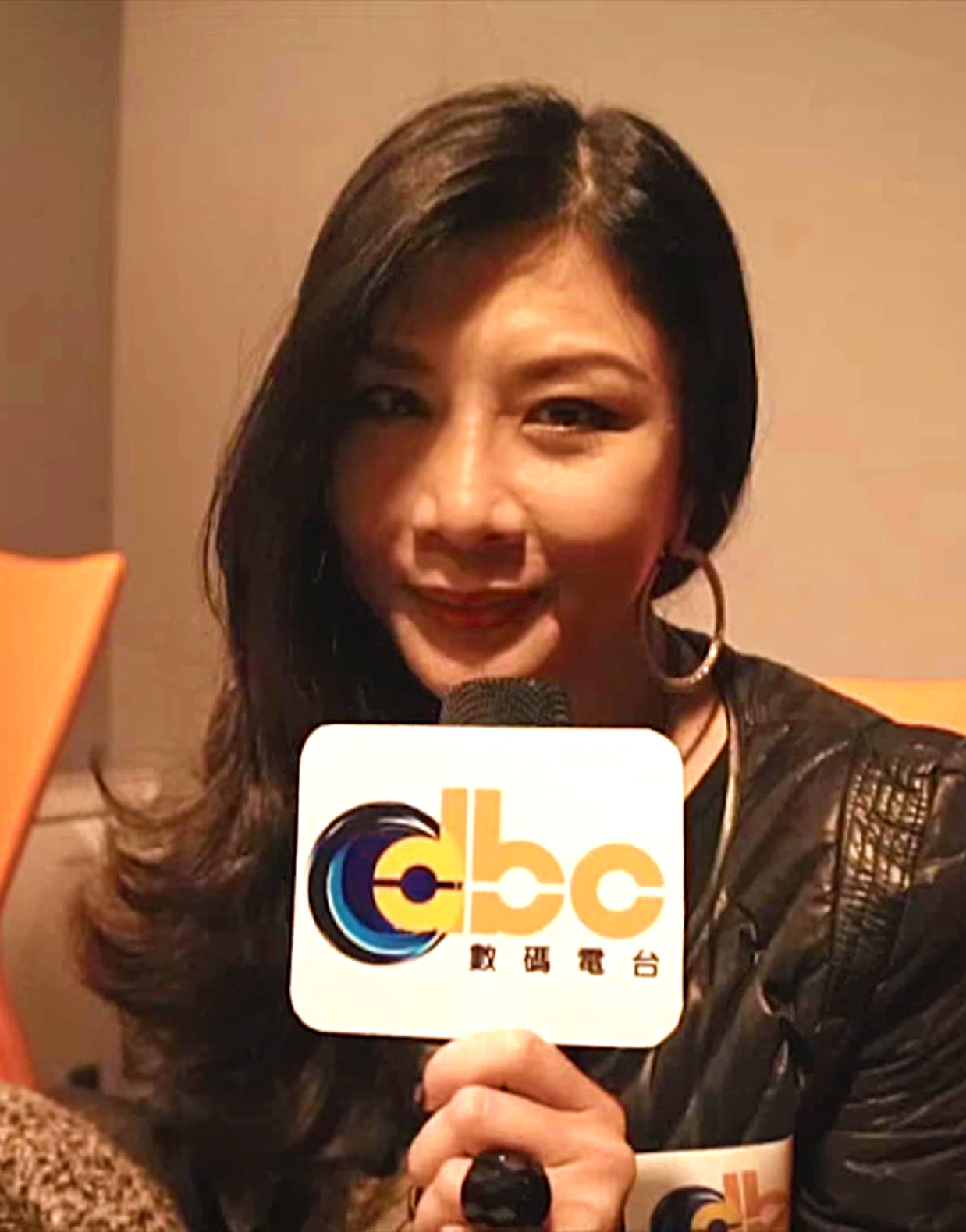 中文（香港）: 第30屆金馬獎最佳女主角 + 第19屆香港電影金像獎最佳女配角